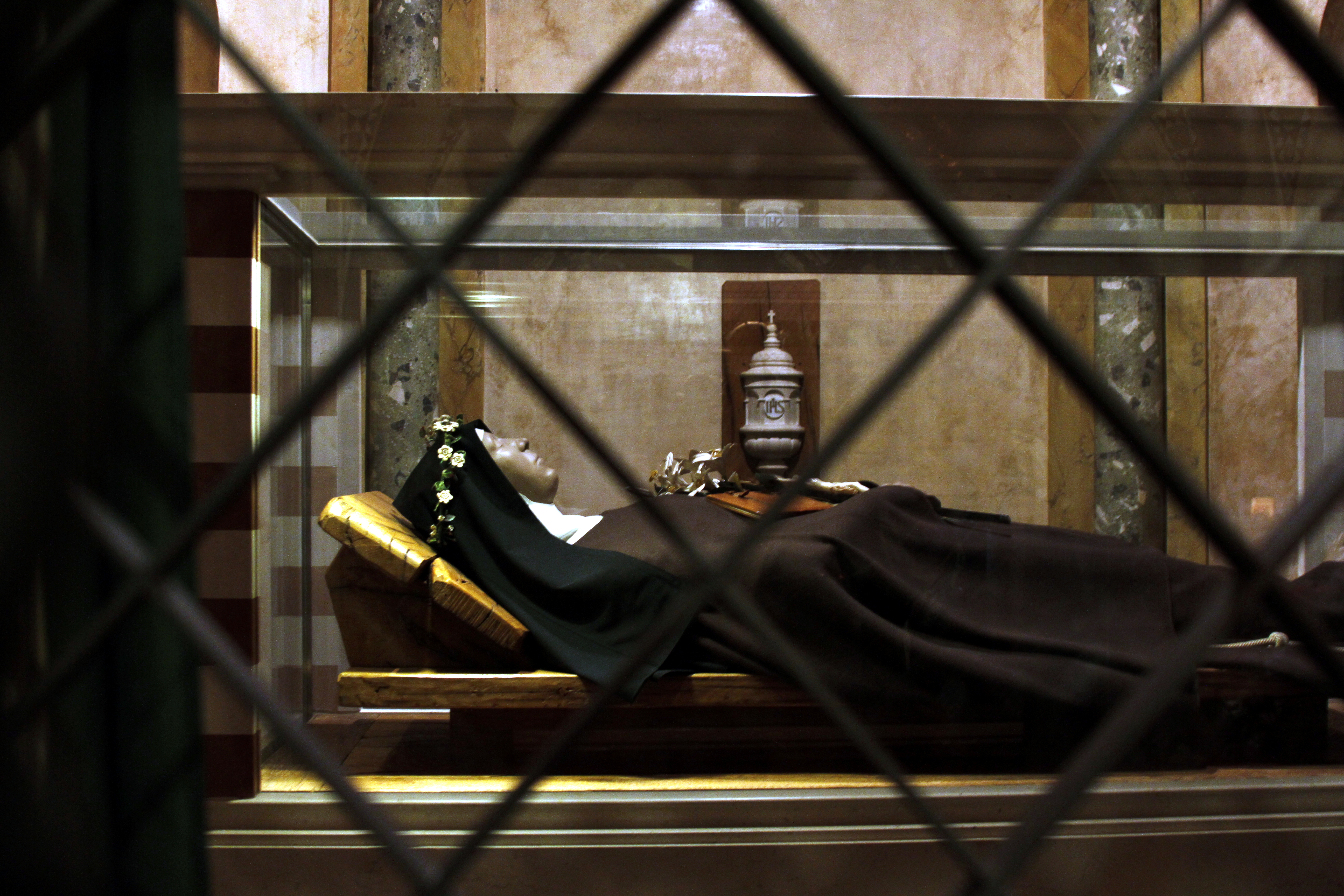 Santa Chiara - Santa Chiara